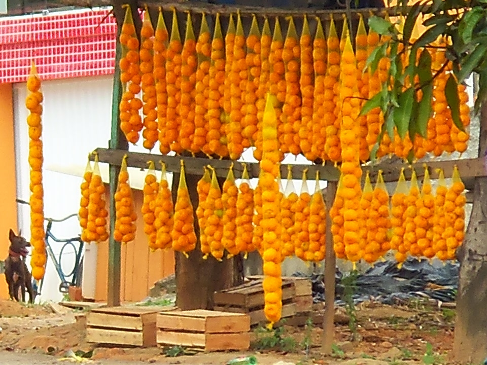 Barraca de mexericas na BR-101 em Fundão.